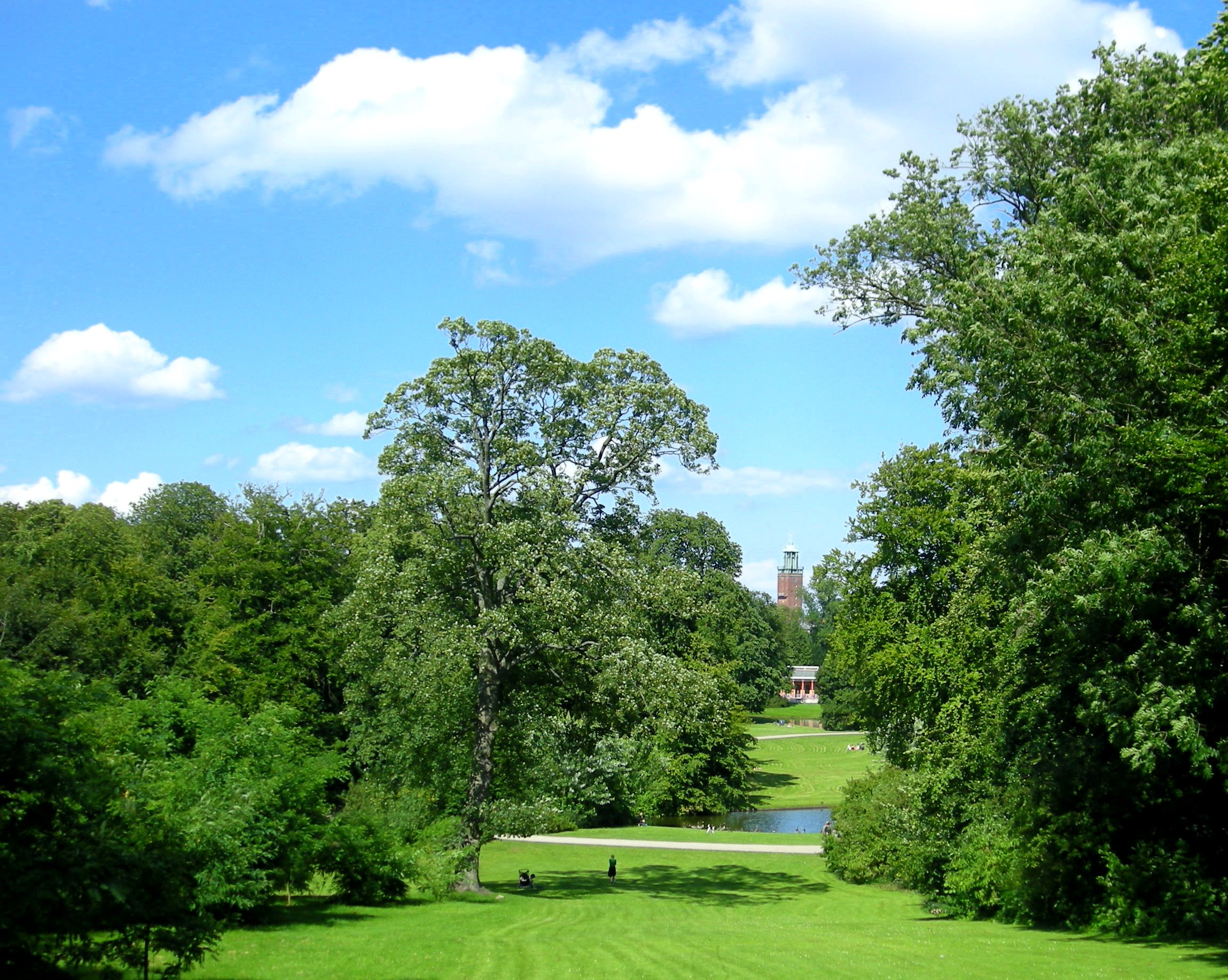 Frederiksberg Garden with a peek of Frederiksberg Town Hall in Copenhagen, Denmark